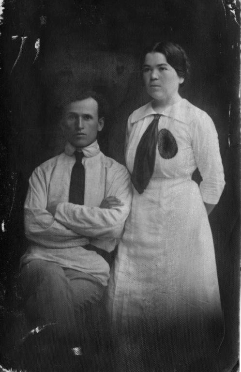 חיותה בוסל ובעלה יוסף בוסל